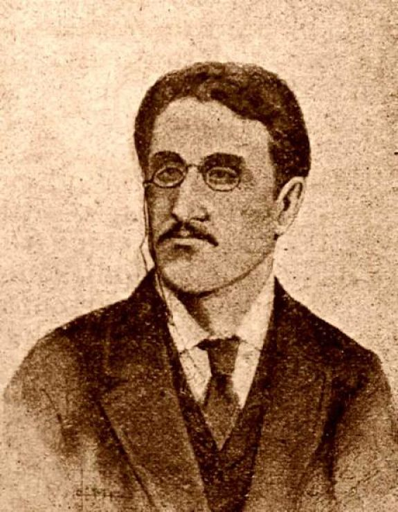 Emilio Covelli, né le 5 août 1846 à Trani et mort le 15 août 1915 à Nocera Inferiore est un membre de la Fédération italienne de l'Association internationale des travailleurs (Première Internationale) et précurseur du communisme libertaire.